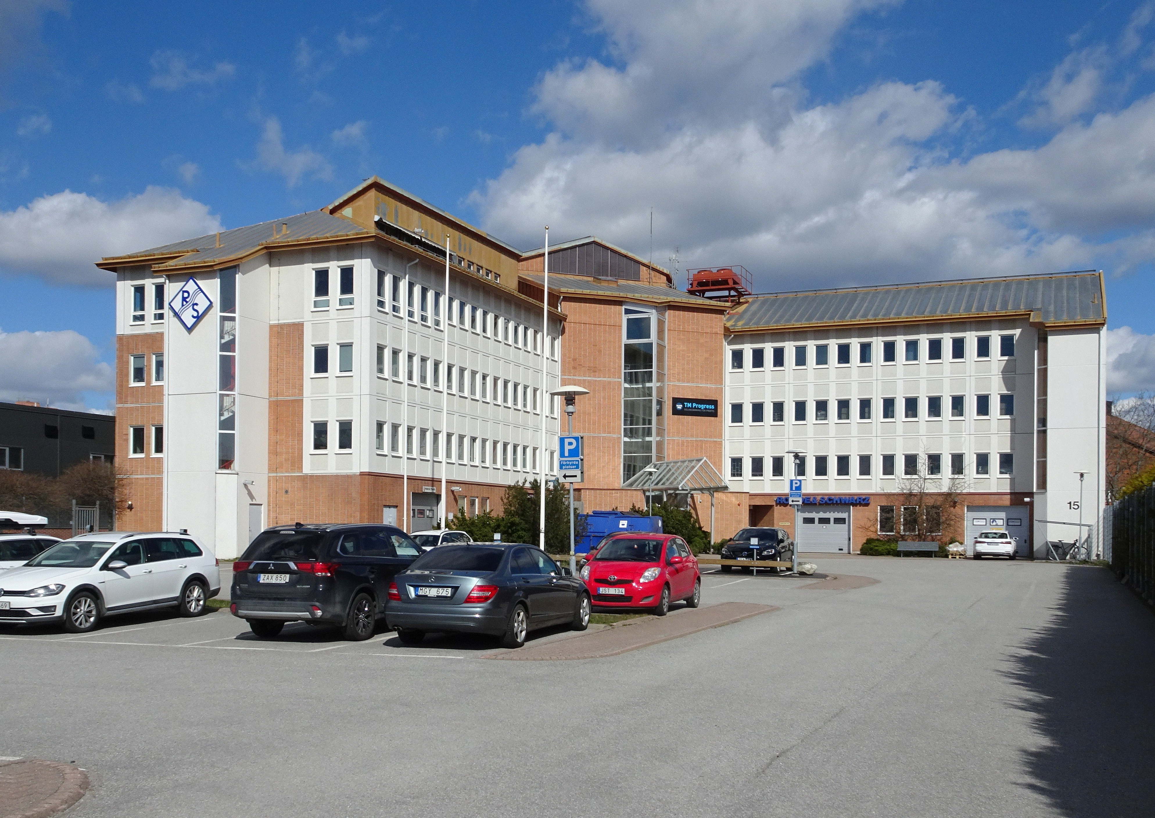 Skarpnäck företagsområde, Rohde & Schwarz, Flygfältsgatan 15